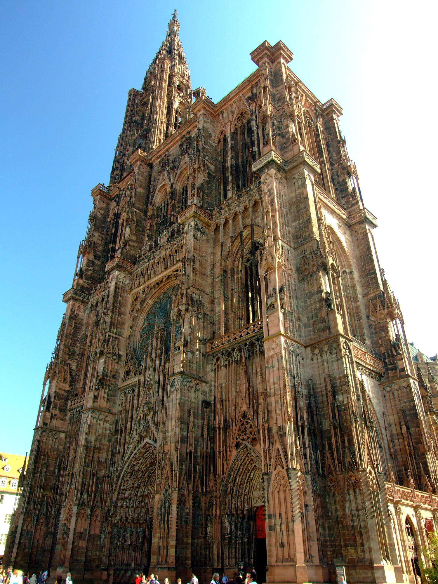 Straßburger Münster